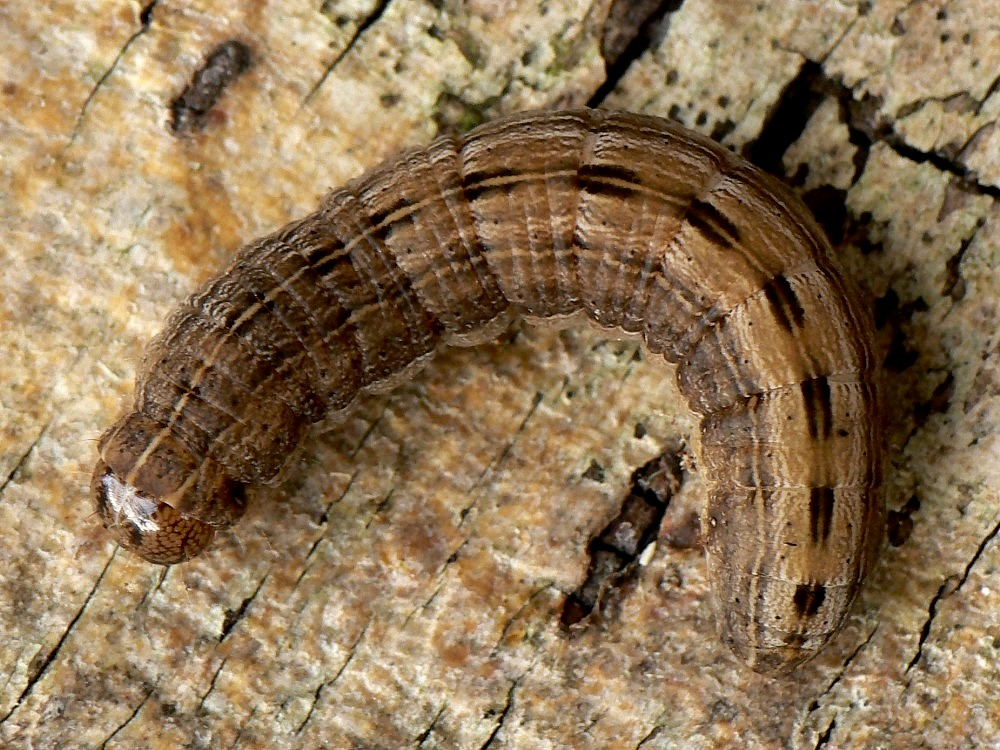 Thalpophila matura larva - Slovakia, Trenčín - Kostolná